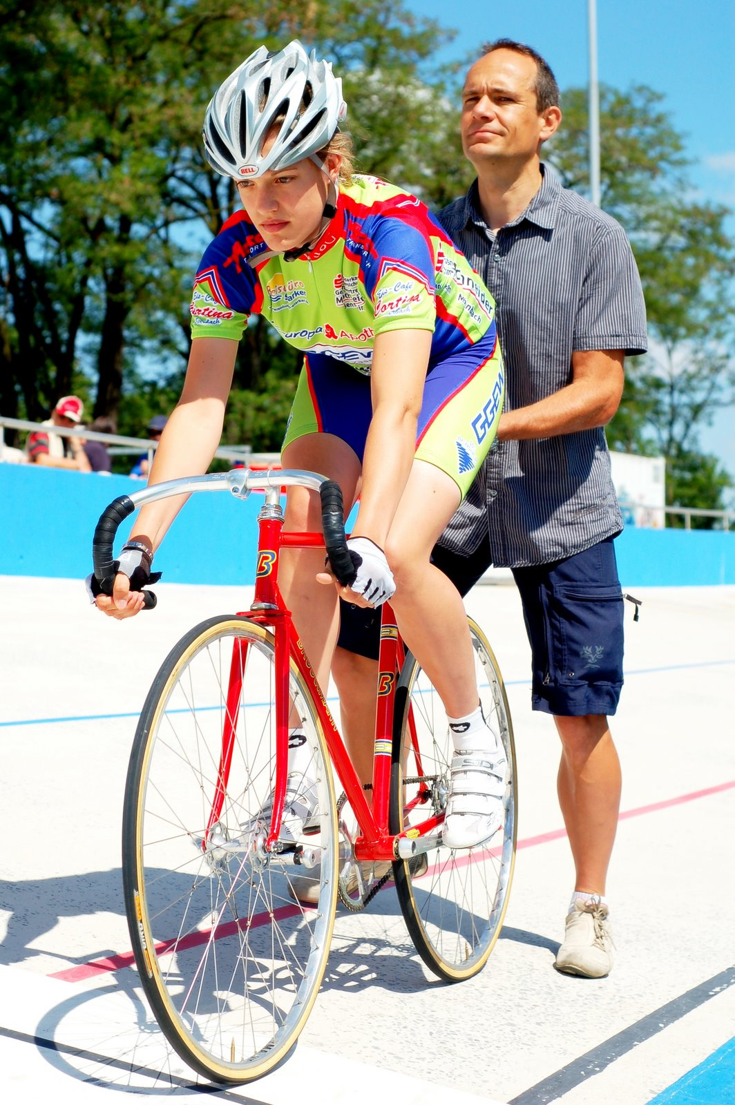 Stehender Start bei den Hessischen Meisterschaften im Bahnradfahren. Lisa Küllmer (auf dem Rad) und Alexander Küllmer als Starter.